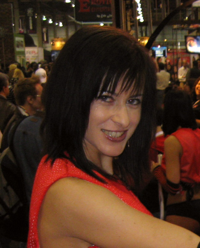 Cecilia Vega at AEE 2009